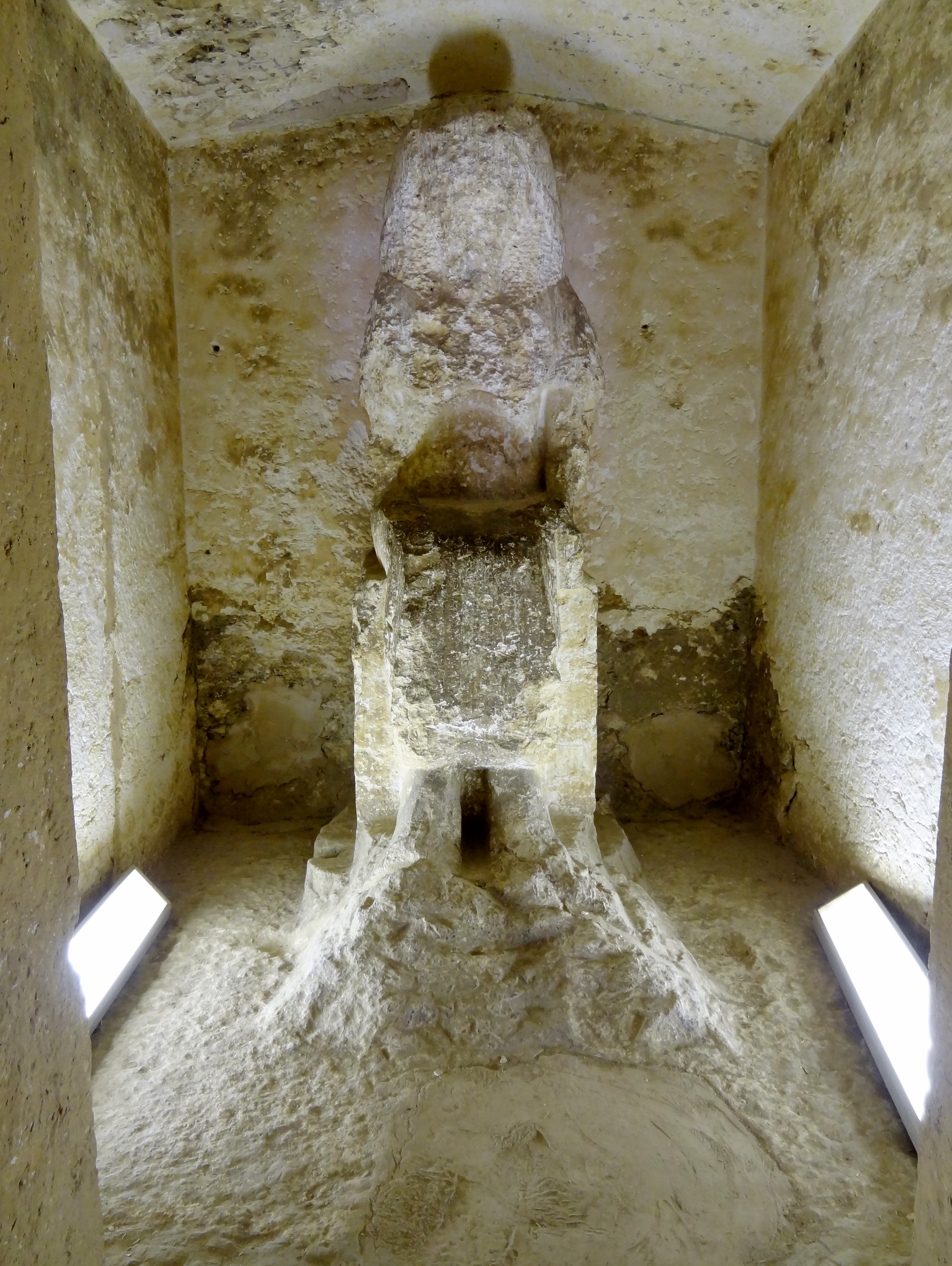 Grab des Ahmose (TA 3) in Tell el-Amarna, Ägypten